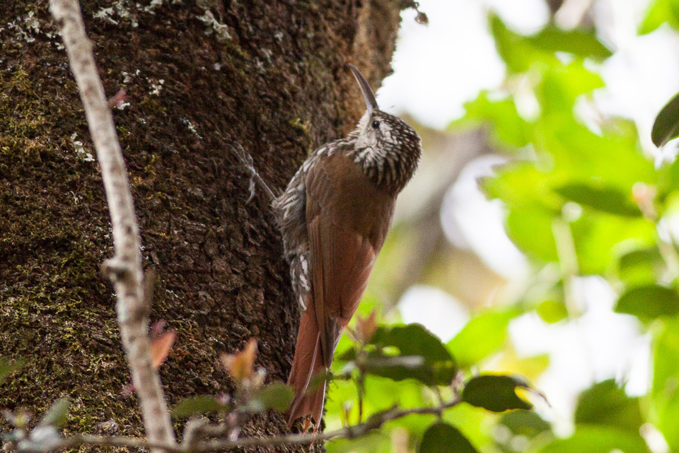 Durango Highway,Sinaloa